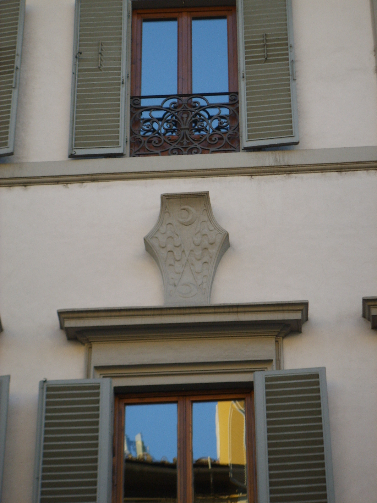 Palazzo_Vettori in Florence